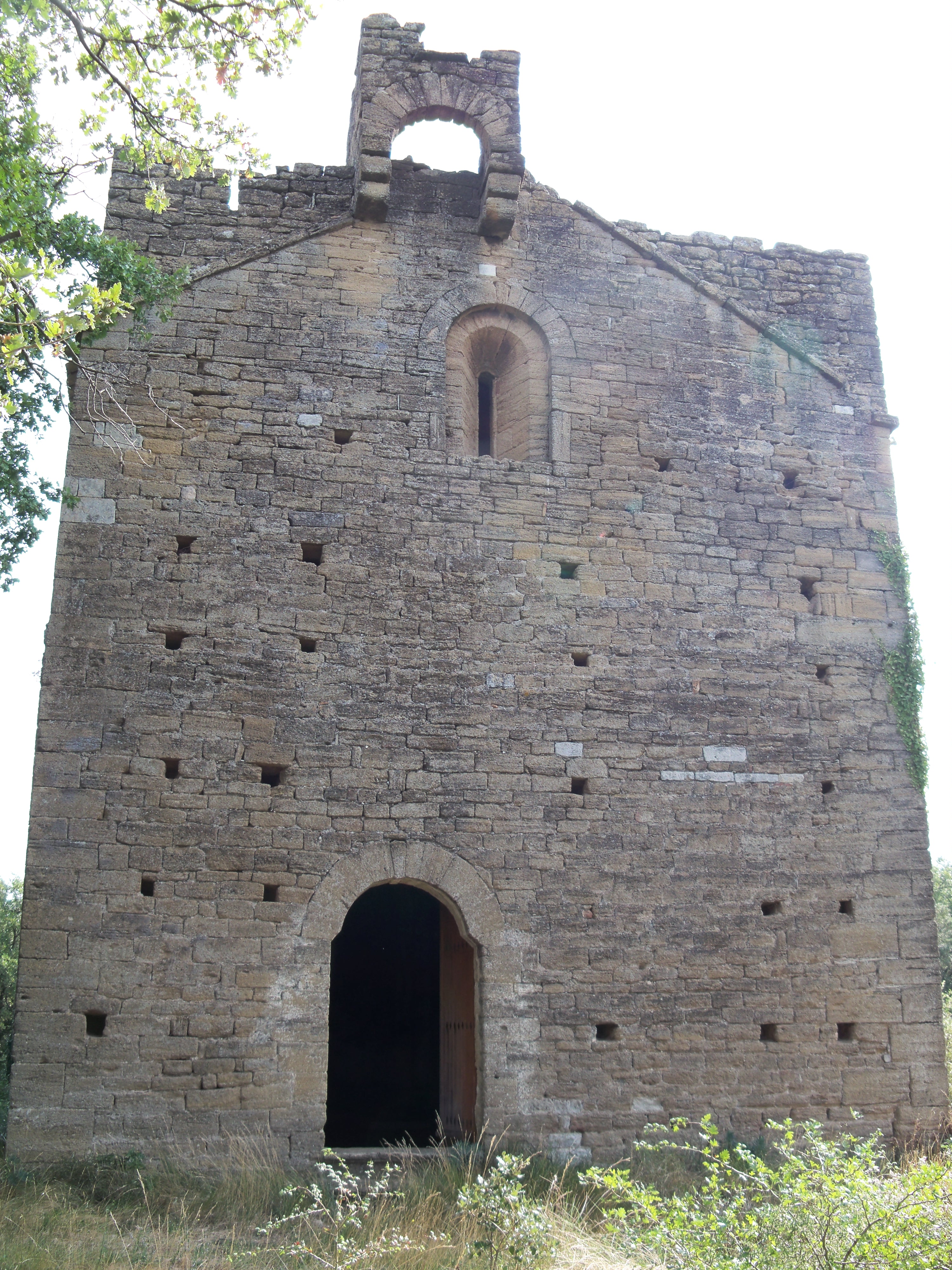 Chapelle Notre-Dame-des-Aubagnons, (Inscription, 1926) : façade .